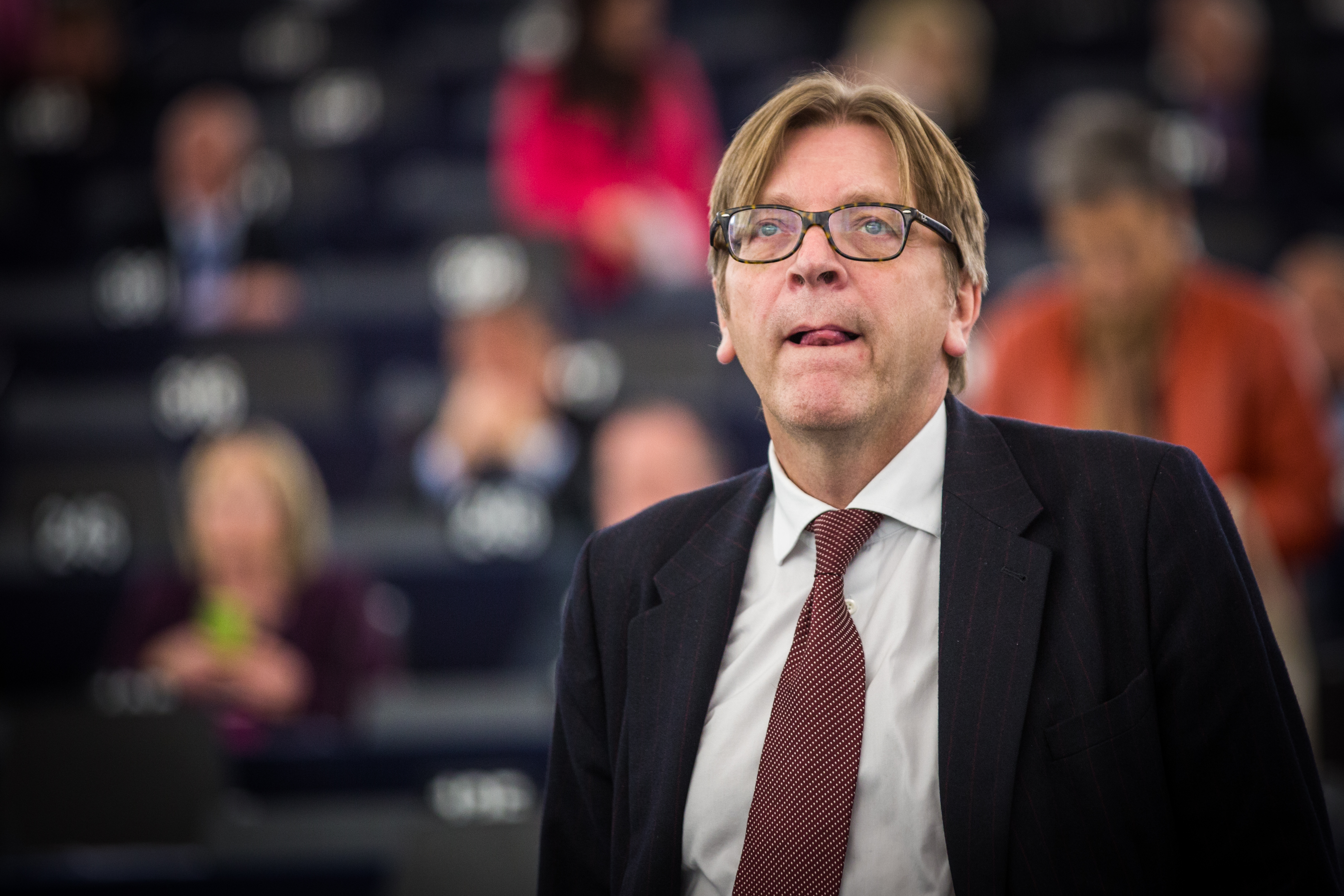 Guy Verhofstadt Parlement européen Strasbourg 26 nov 2014